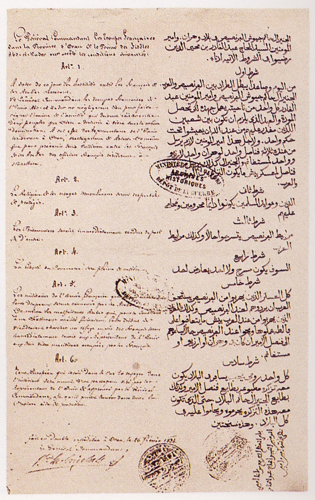 Traité de paix et d'amitié conclu à Oran le 26 février 1834 entre la France et Abd-el-Kader.